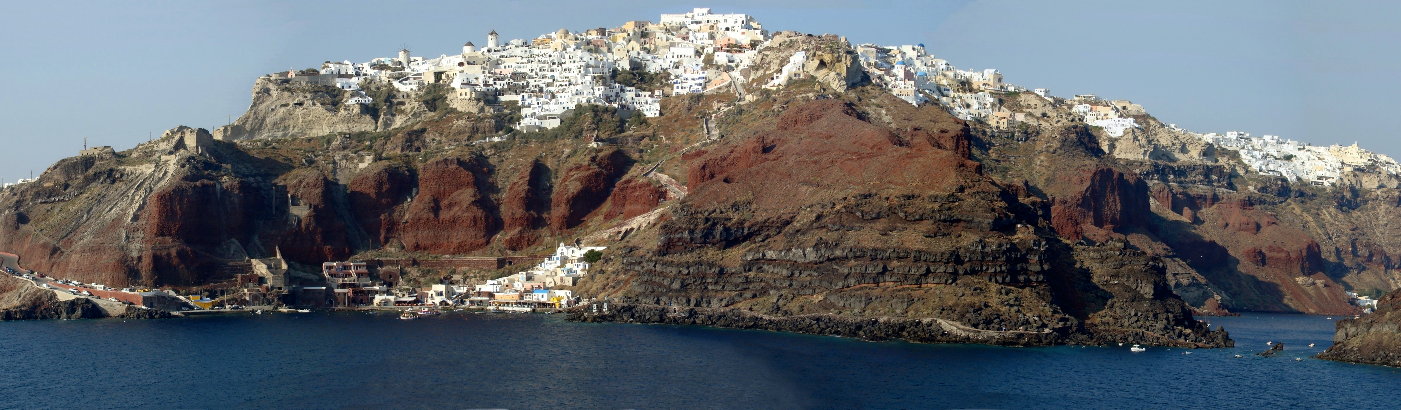 Steilküste von Santorin mit dem Ort Oia